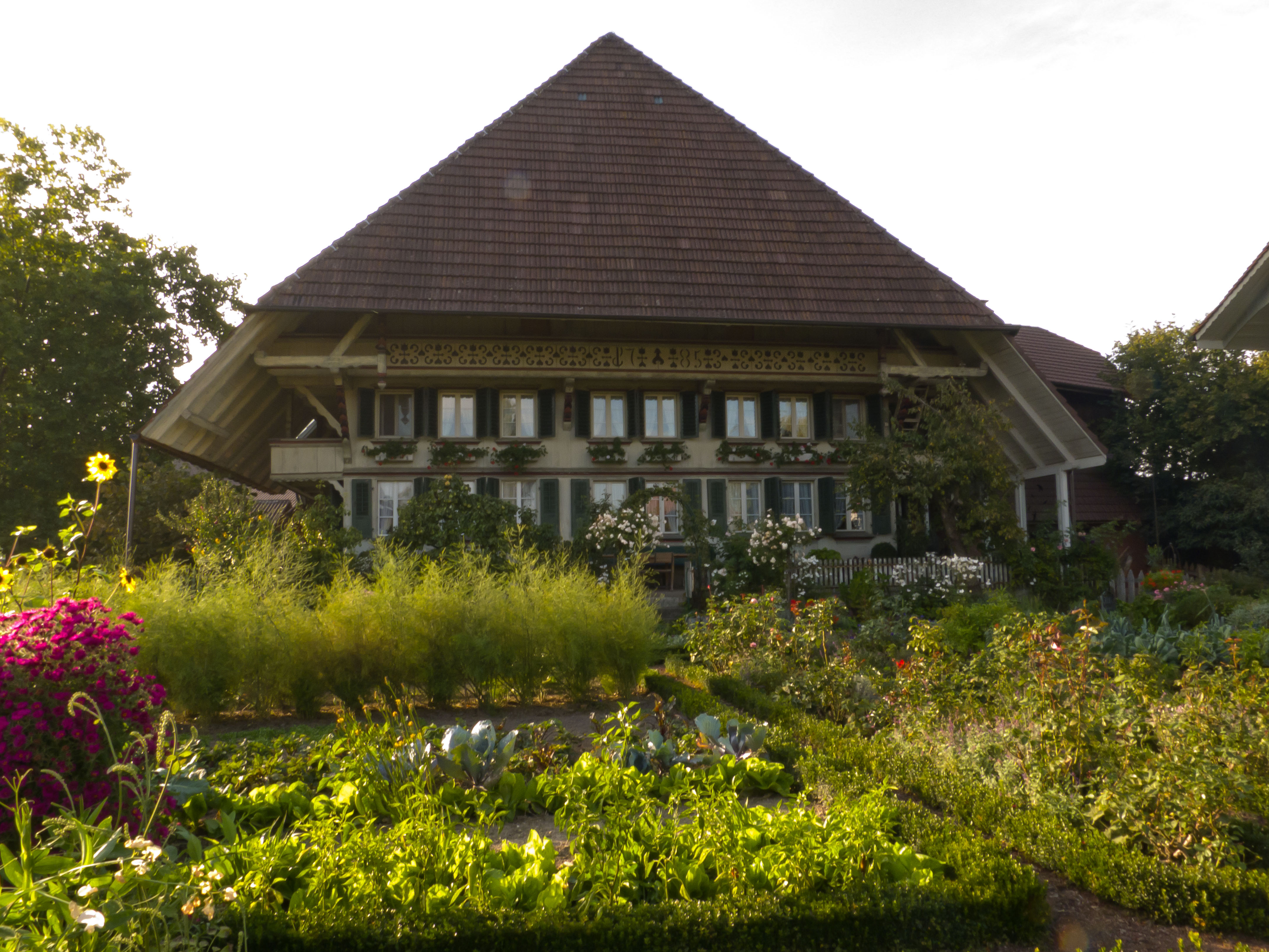 Niederösch, Hof Dorfstrasse 5, erbaut 1785, seither im Familienbesitz